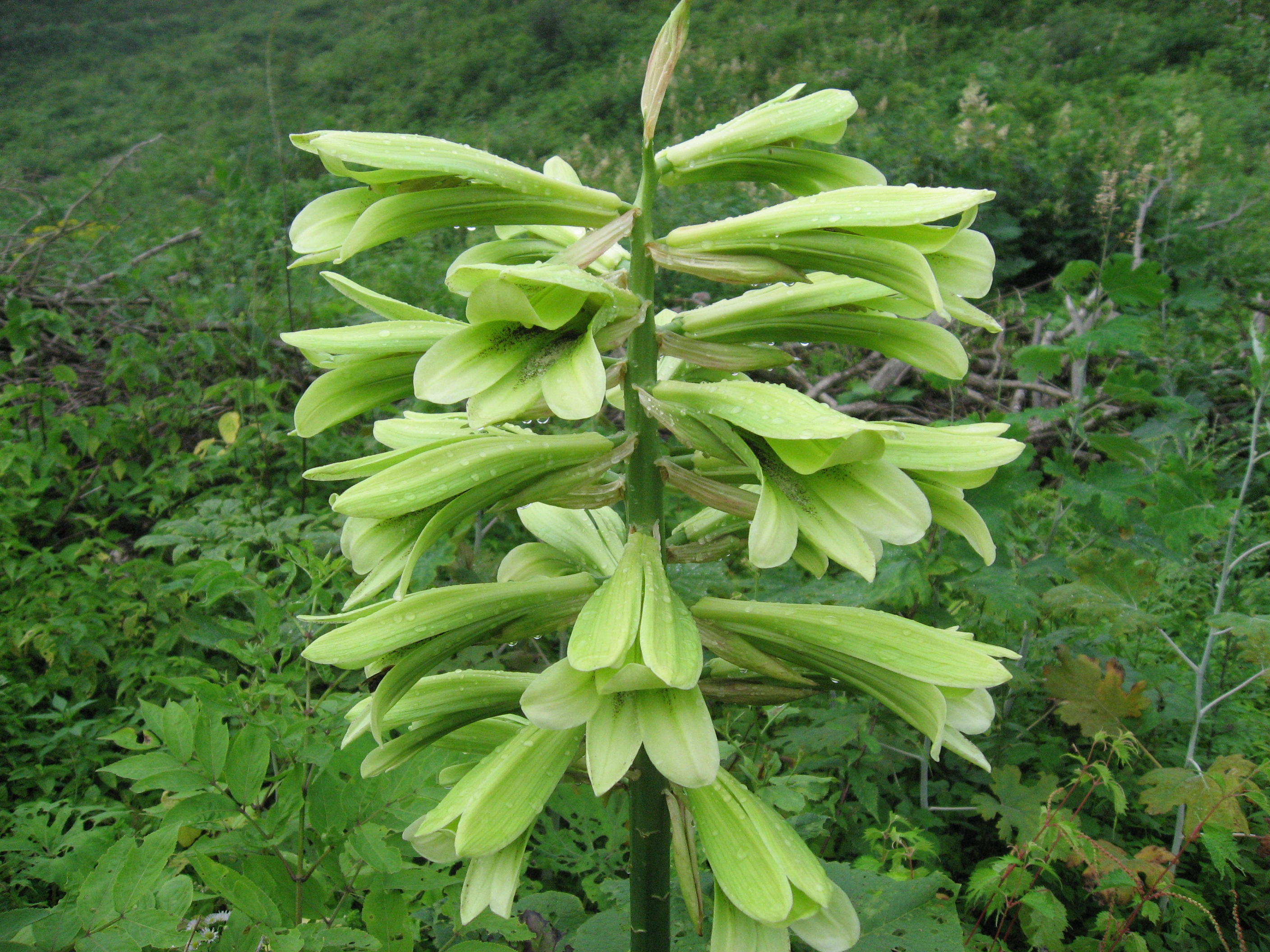 Cardiocrinum cordatum var. glehnii